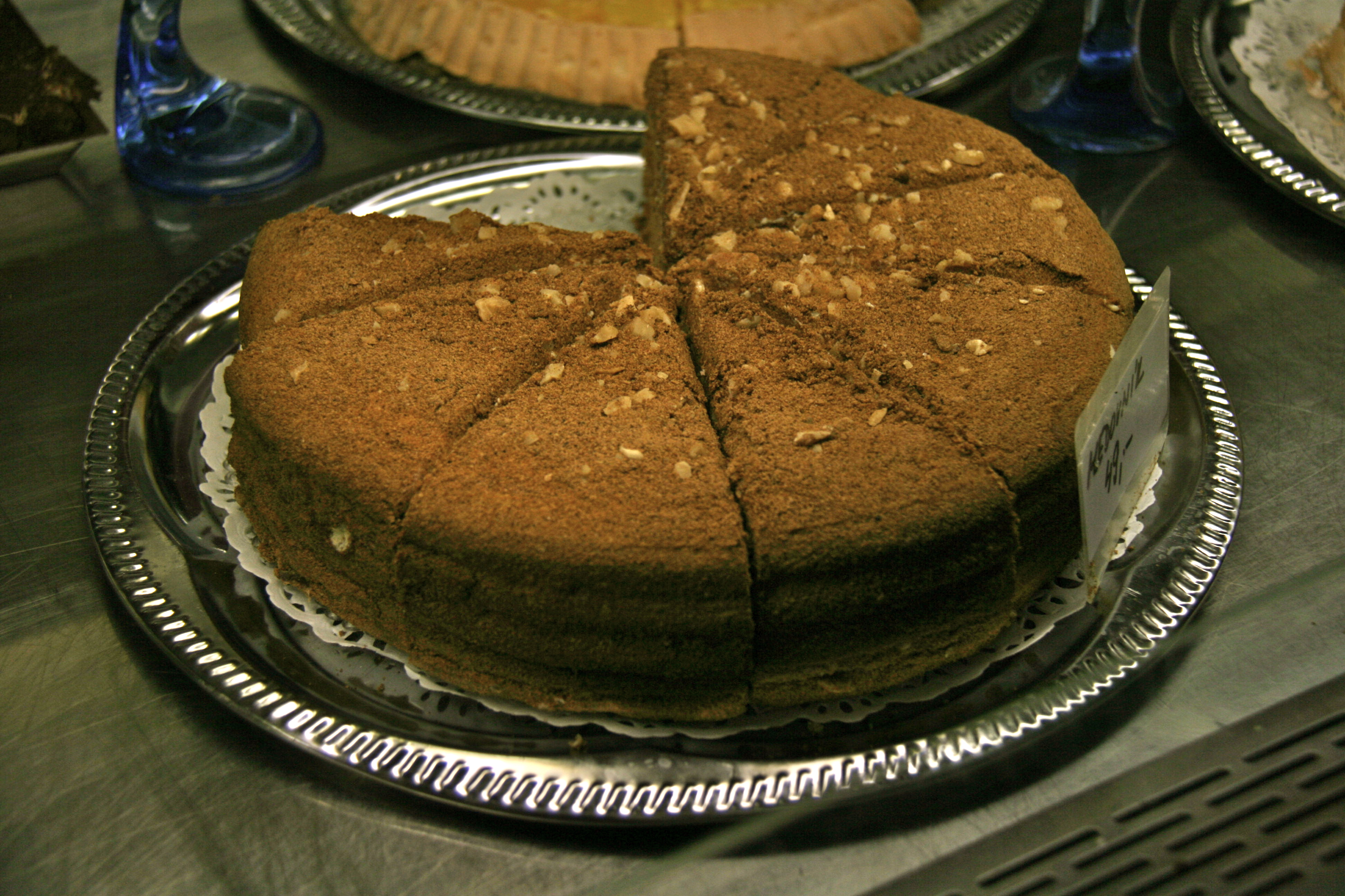 Medovník